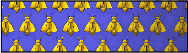 Prince d`Empire